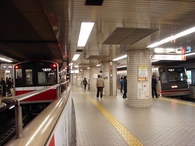 御堂筋線なんば駅ホーム。